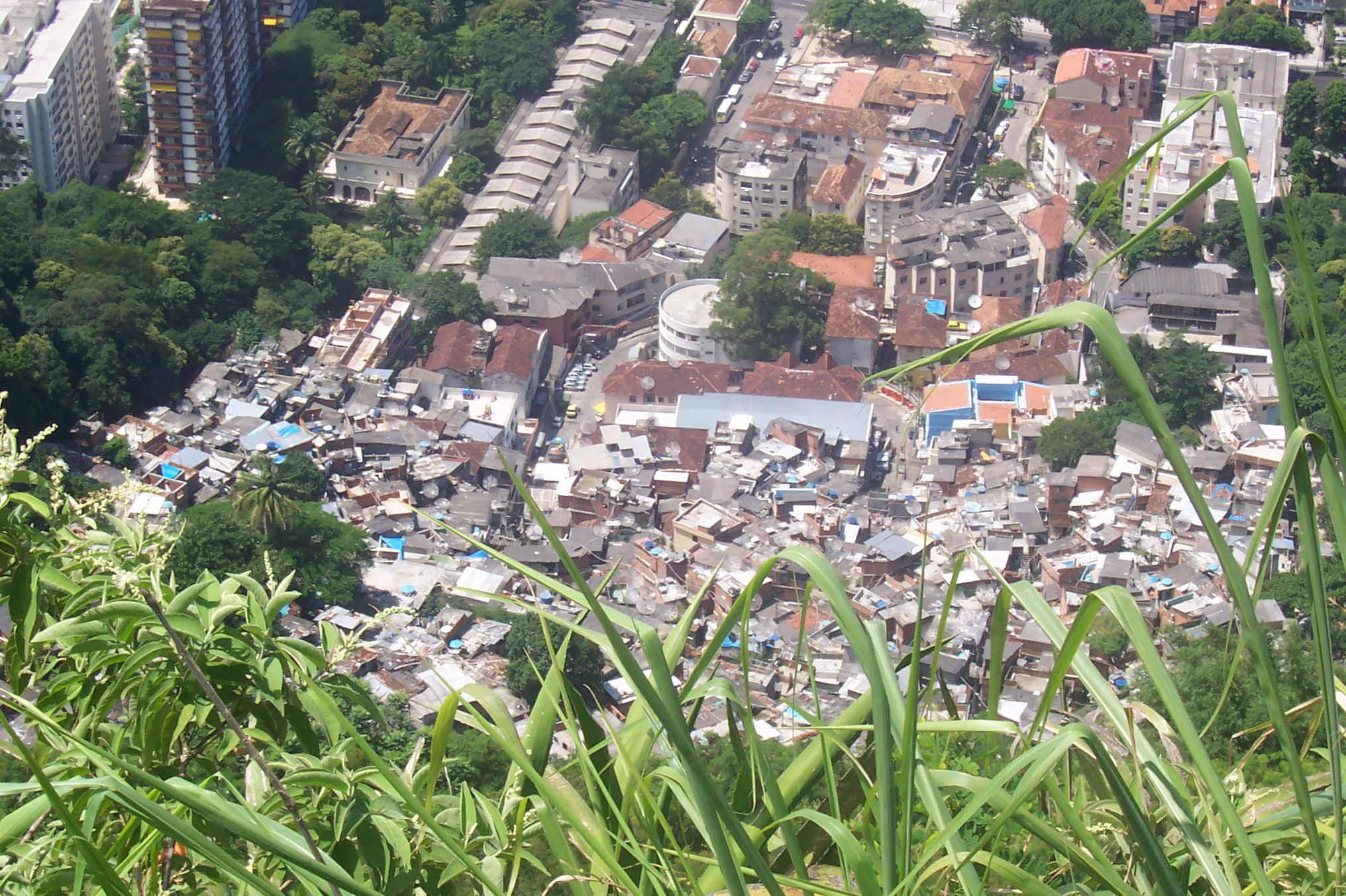 View of Favela Dona Marta, Botafogo, Rio de Janeiro